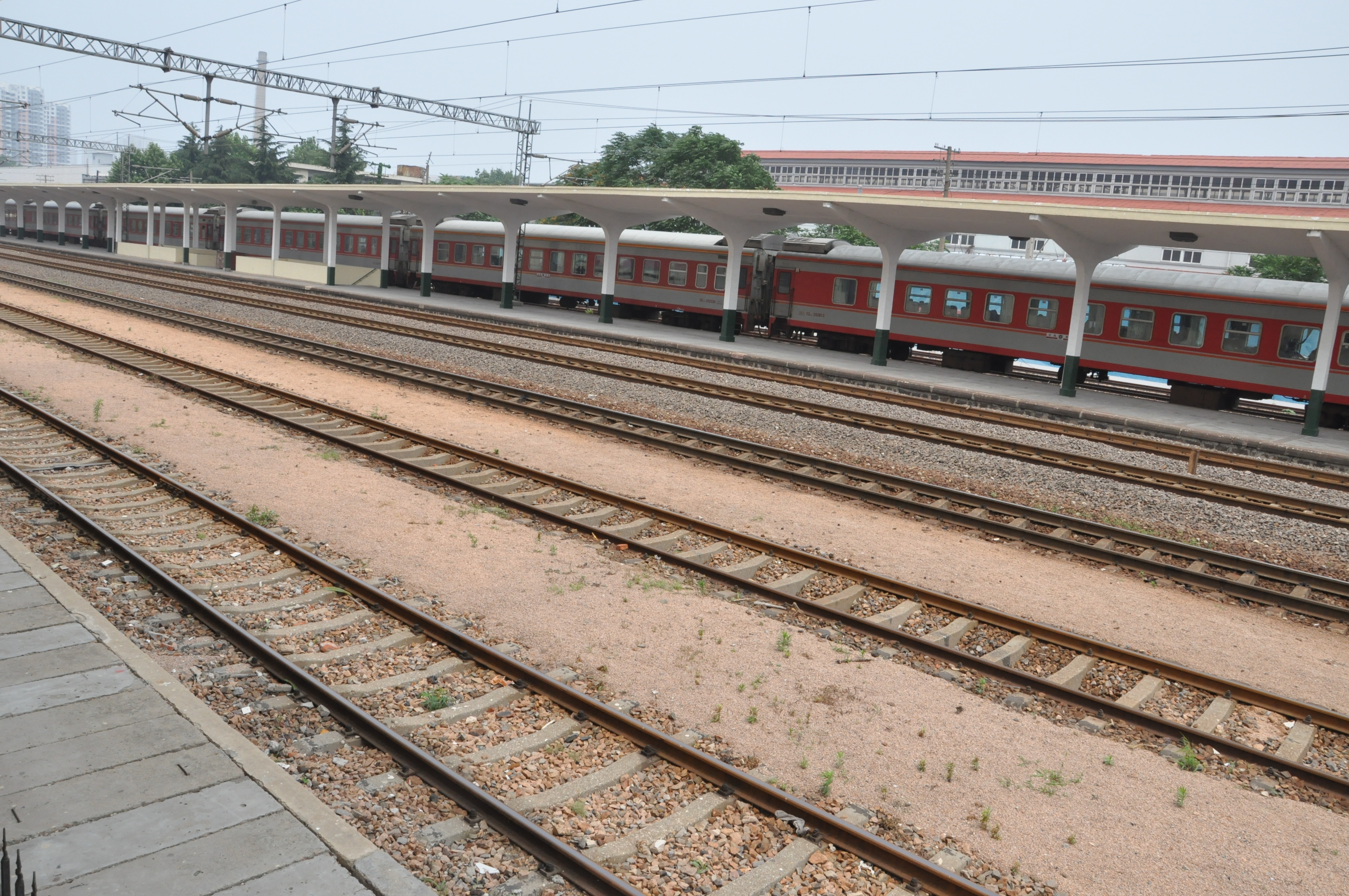 胶济铁路四方站站台，摄于站房办公楼侧面的消防楼梯上。